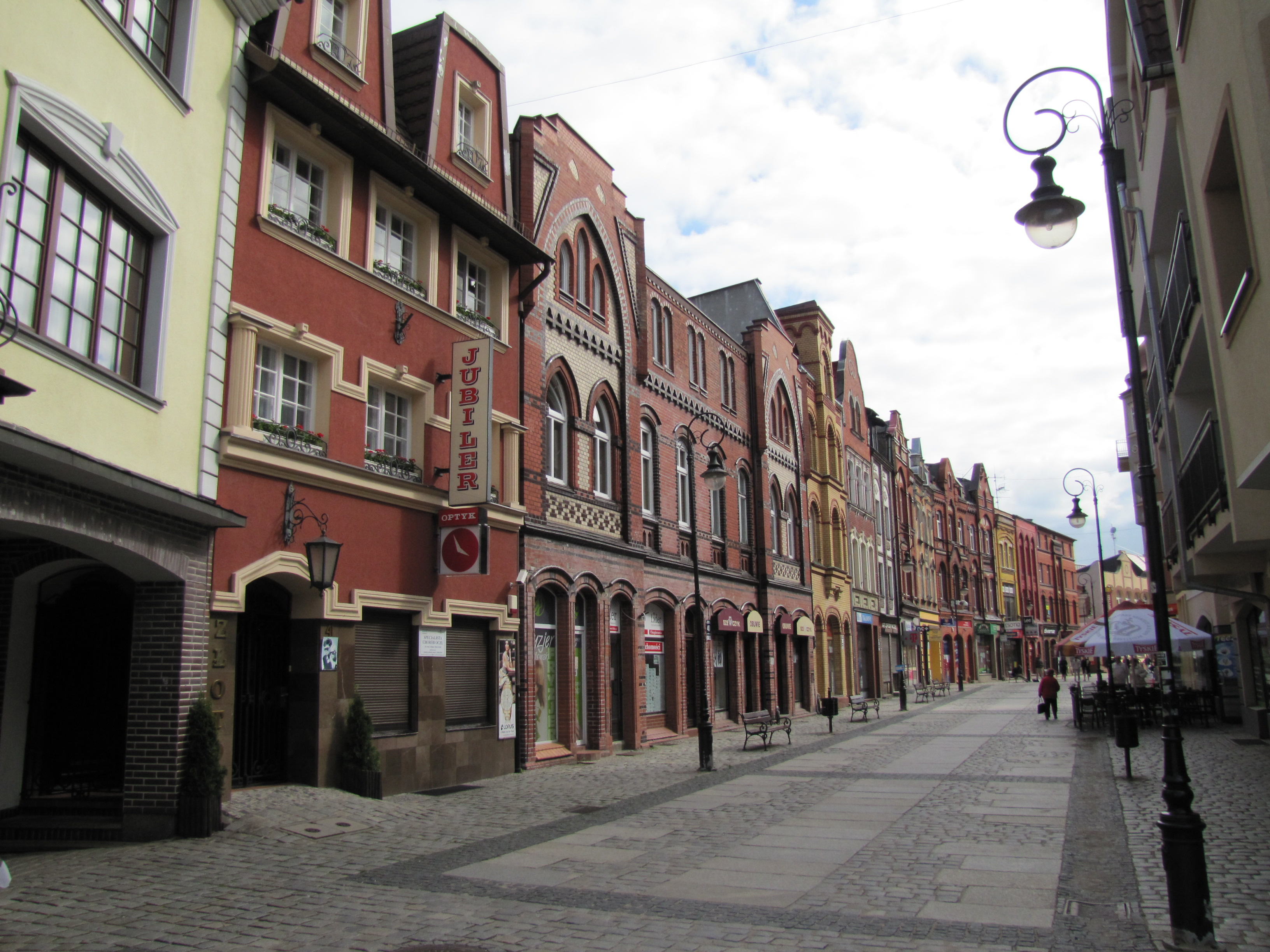 Cudne kamienice Starego Miasta.